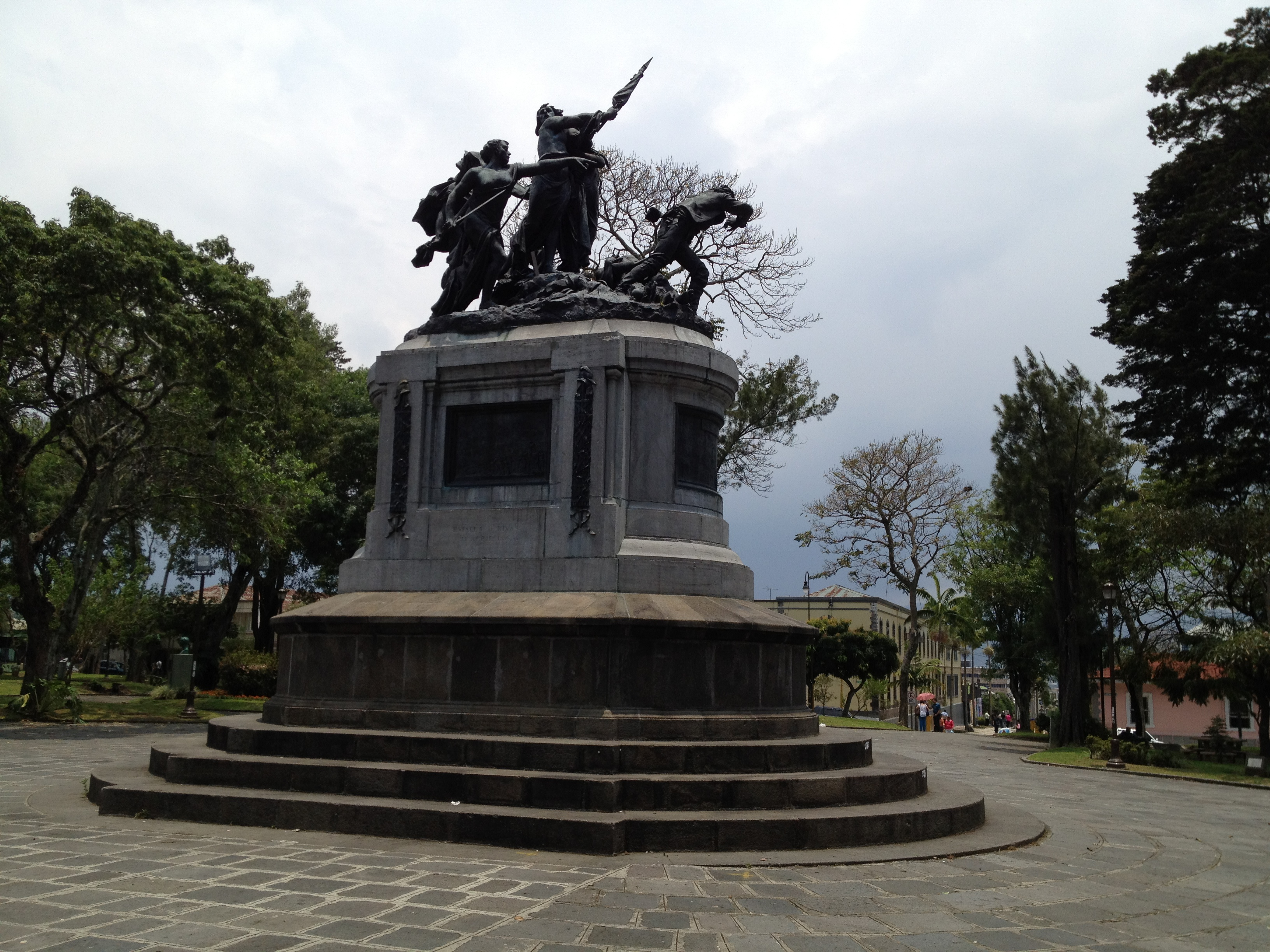 Monumento Nacional im National Park, San Jose, Costa Rico bei Louis-Robert Carrier-Belleuse 1891